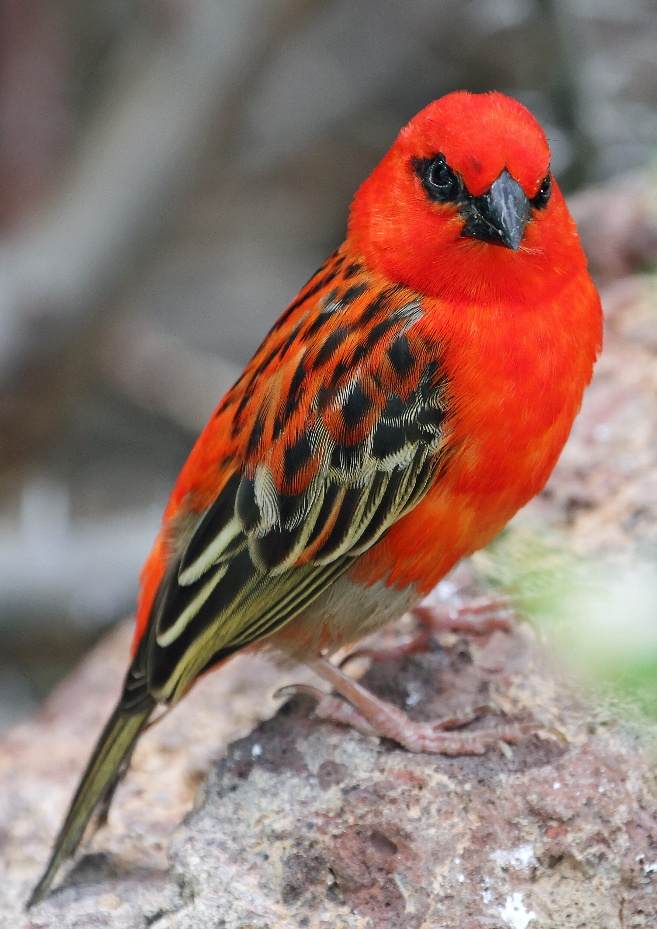 Ein Madagaskarweber im Wüstenhaus.